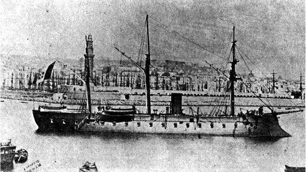 La pirofregata corazzata Castelfidardo